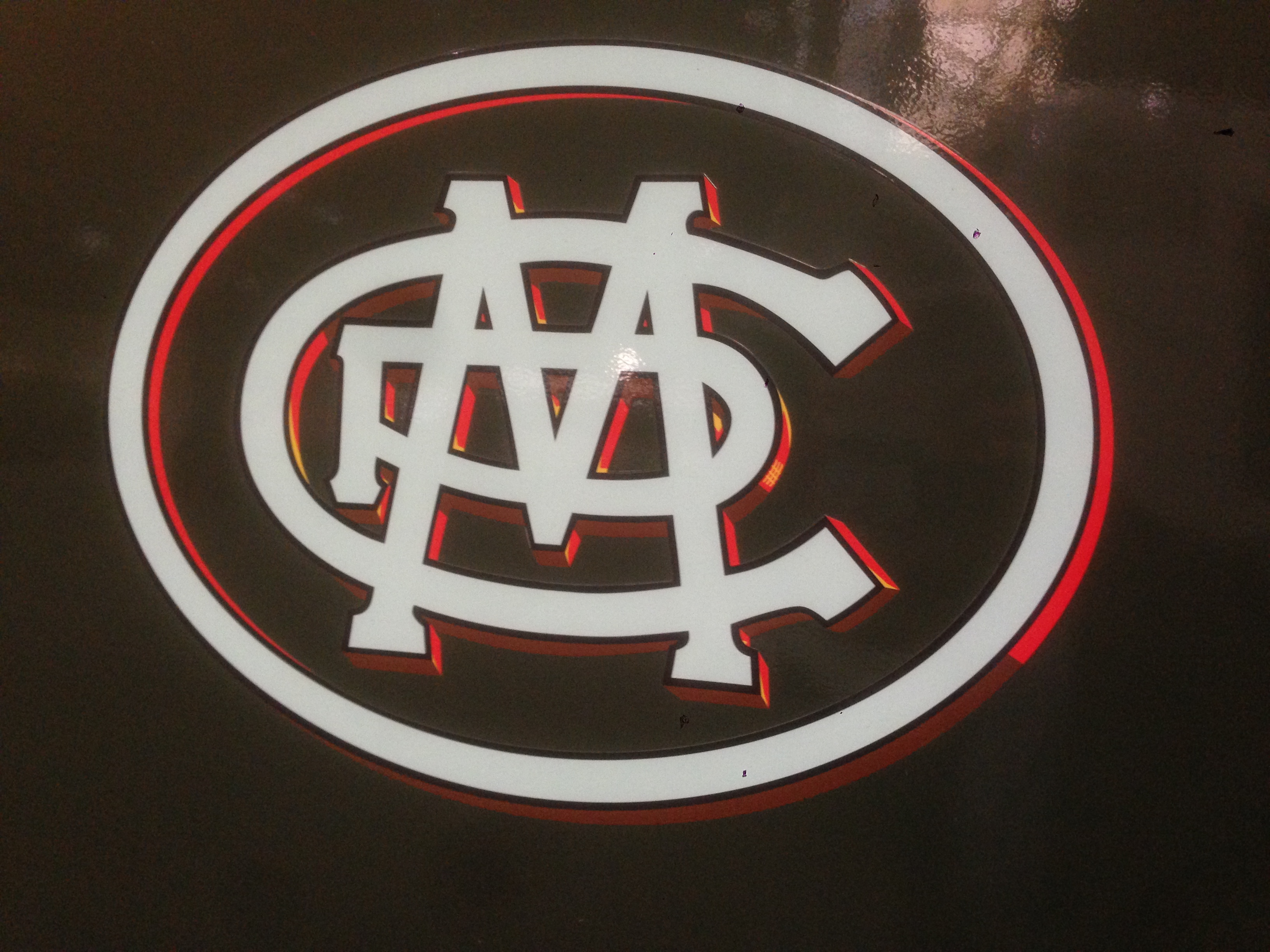 Logo de la CMP (Compagnie du chemin de fer métropolitain) sur un train de la série Z 23000